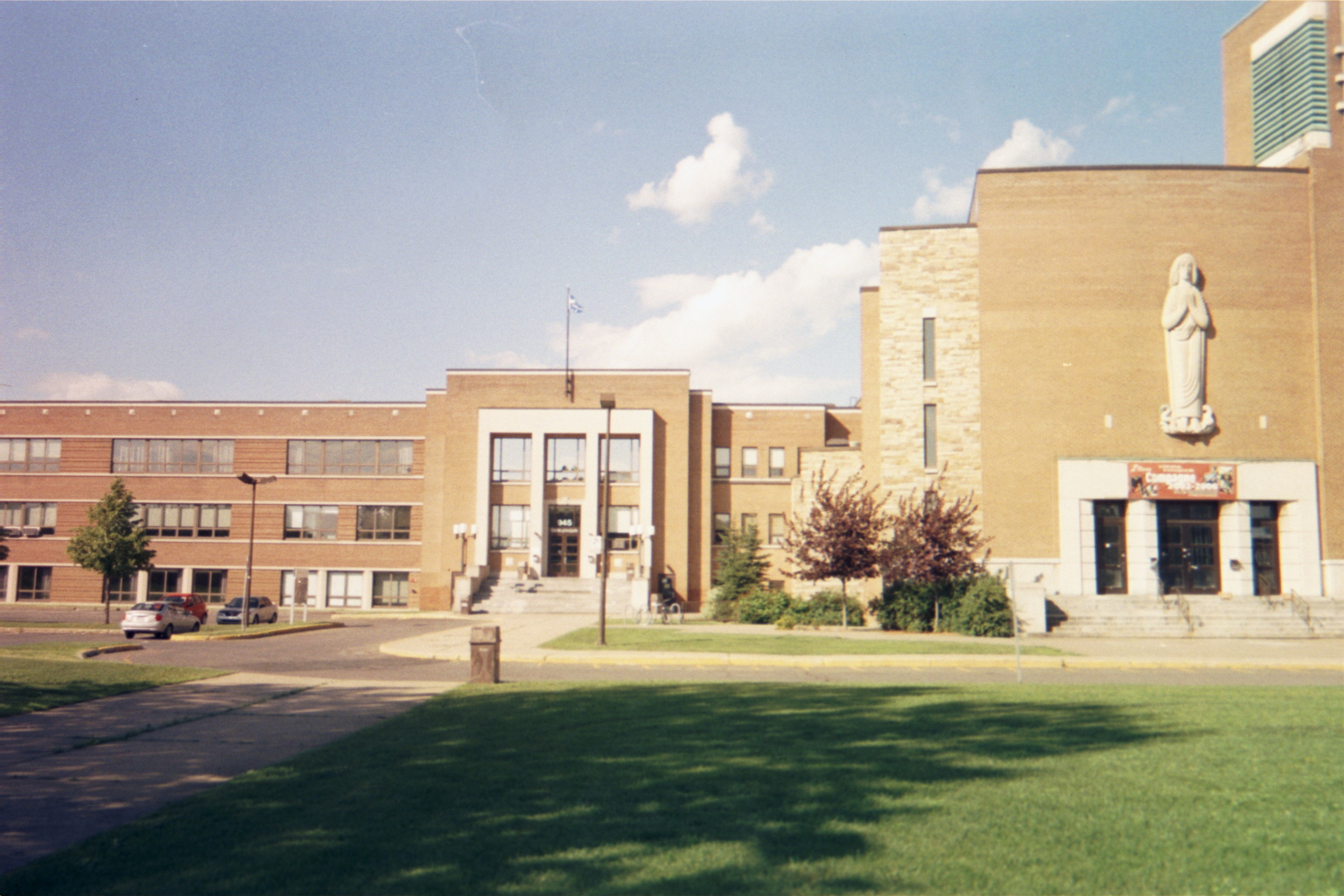 Collège Édouard-Montpetit, vu d'en face sur le chemin Chambly. Photo prise par Utilisateur:ADM le 24 juillet 2005. Licence